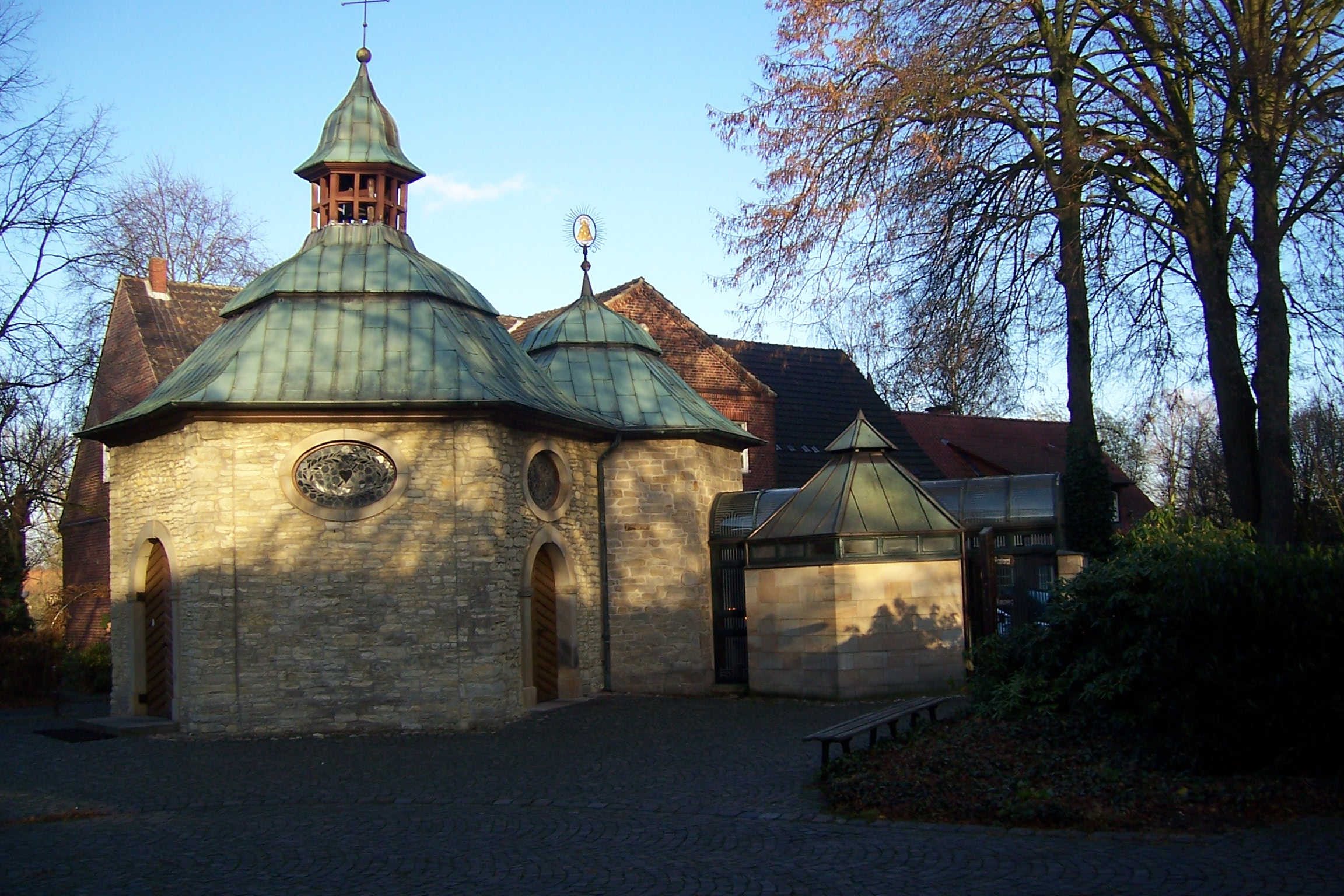 Wallfahrtskapelle (Mitte 19. Jhdt.) in Eggerode, Kreis Borken, NRW. Der Chorraum und die Kerzenkapelle wurden später zugefügt.